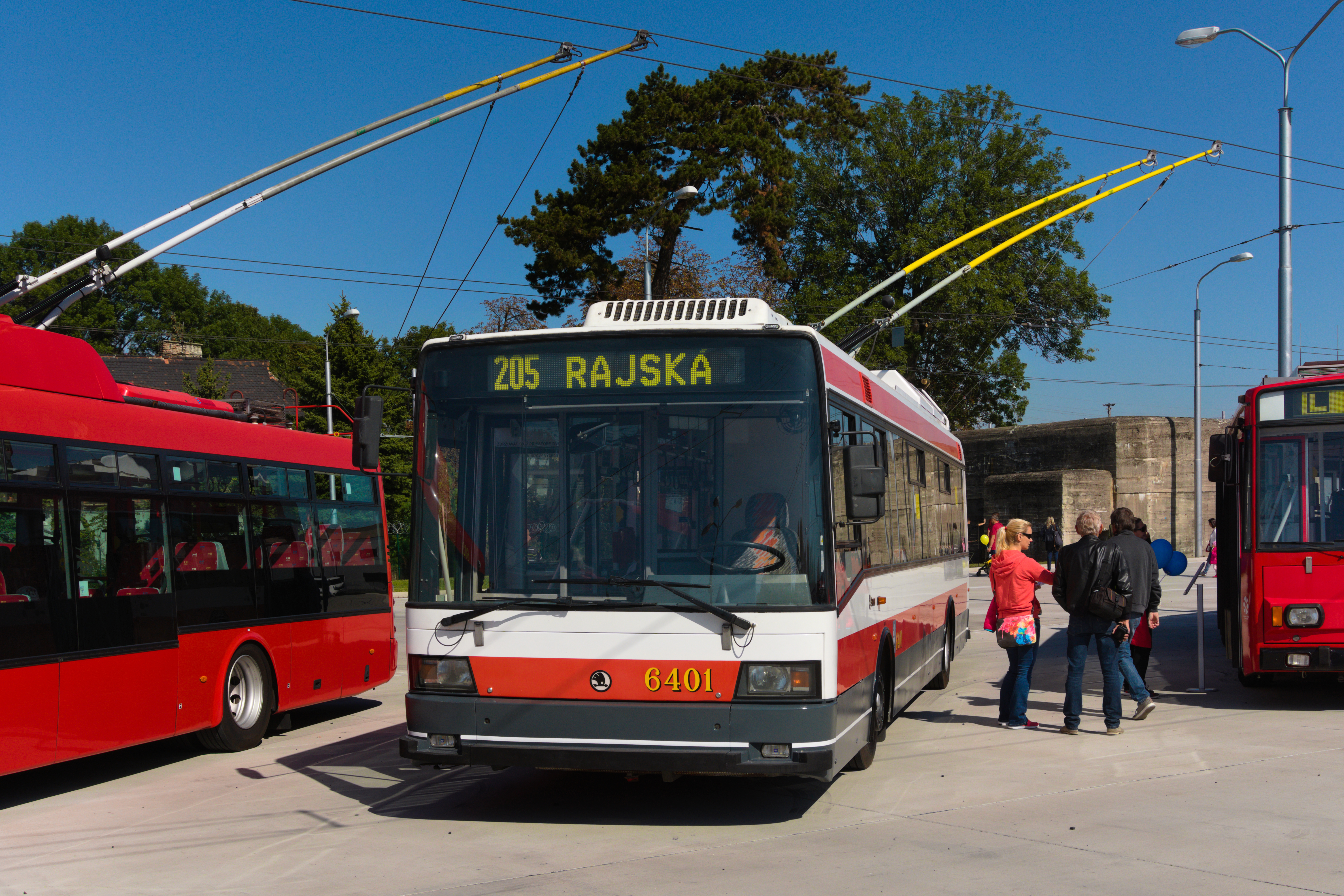 Škoda 21 Tr Nr. 6401 am Gelände des Betriebshofes "Vozovňa Jurajov dvor"